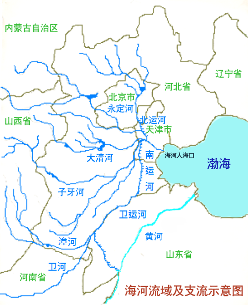 海河流域图 自己画的